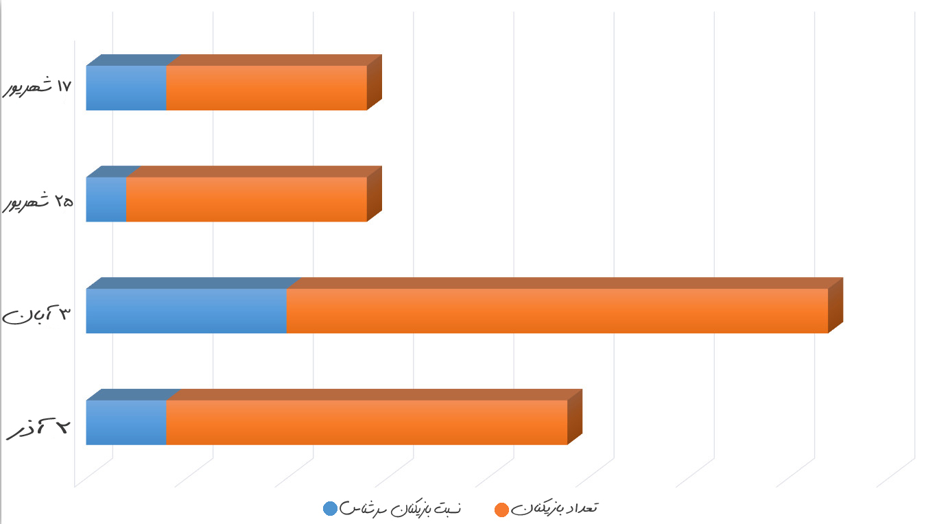 نمودار تعداد نسبی بازیکنان متخلف در جنجال کارت معافیت بازیکنان فوتبال